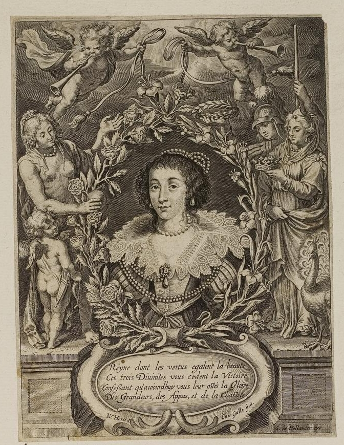 Grafik aus dem Klebeband Nr. 1 der Fürstlich Waldeckschen Hofbibliothek Arolsen Motiv: Henriette Marie von Frankreich ("Reyne dont les vertus egalent la beauté")